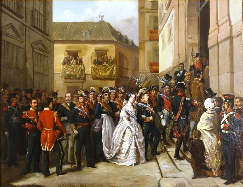 La obra representa a la reina Isabel II de España (1830-1904) y a su esposo, el rey Francisco de Asís de Borbón (1822-1902), visitando el monumento del Jueves Santo en la desaparecida iglesia de Santa María de Madrid, que fue demolida en 1868.